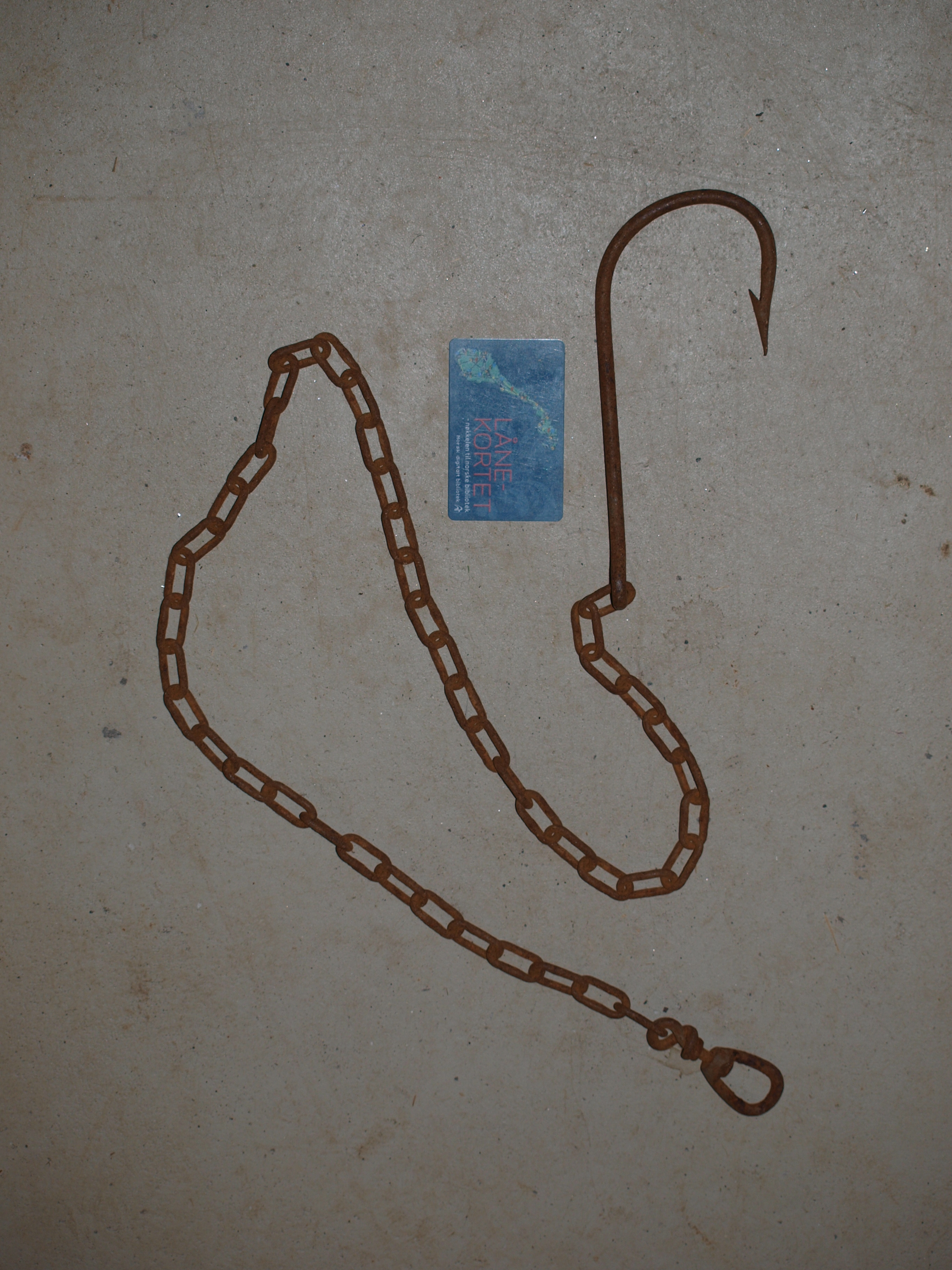 Håkjerringongel brukt til linefiske. Forsyn av kjetting